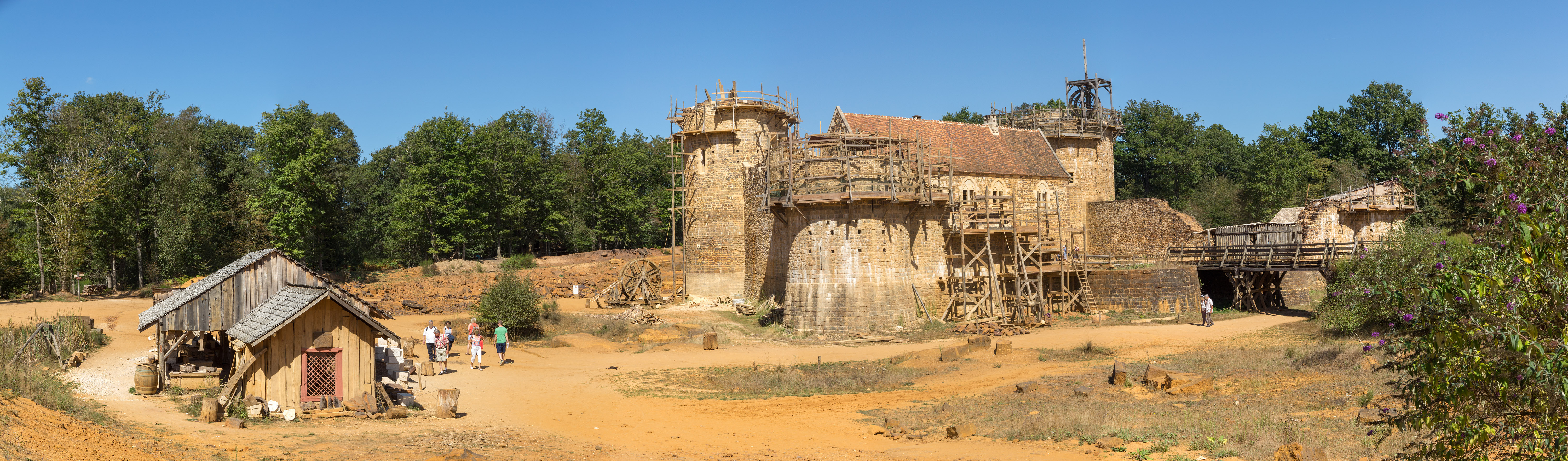 Panorama Gudélon September 2016